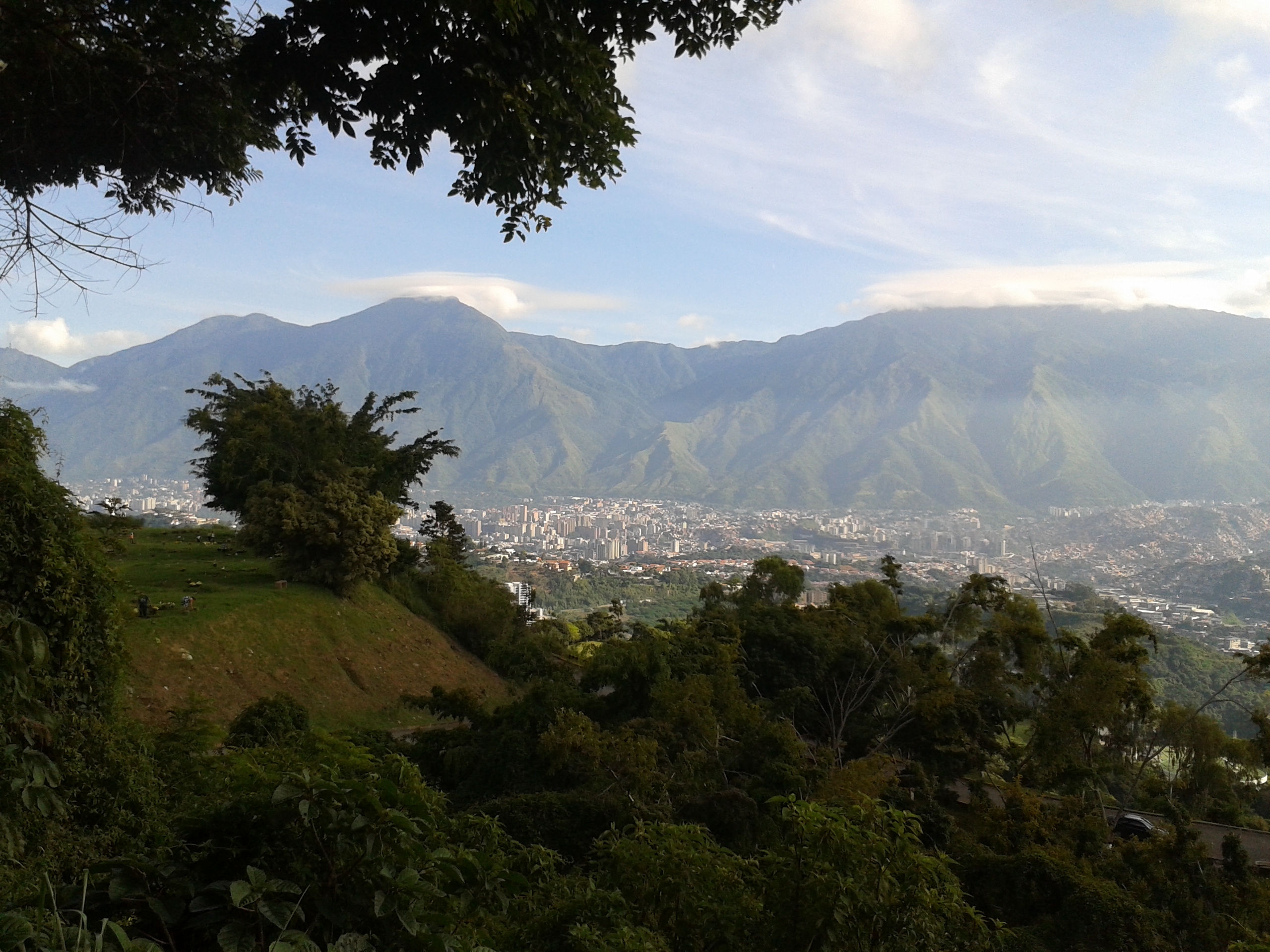 Caracas